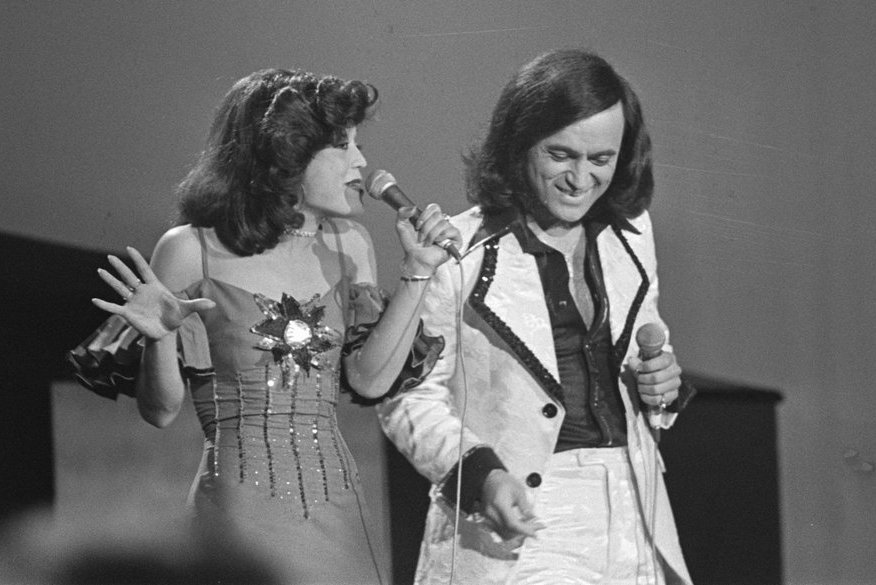 Rosy & Andres tijdens het Nationaal Songfestival 1976